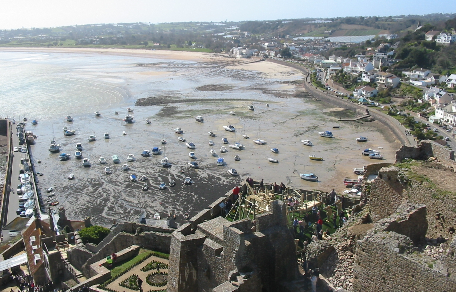 Mont Orgueil Nrf: Vièr Châté